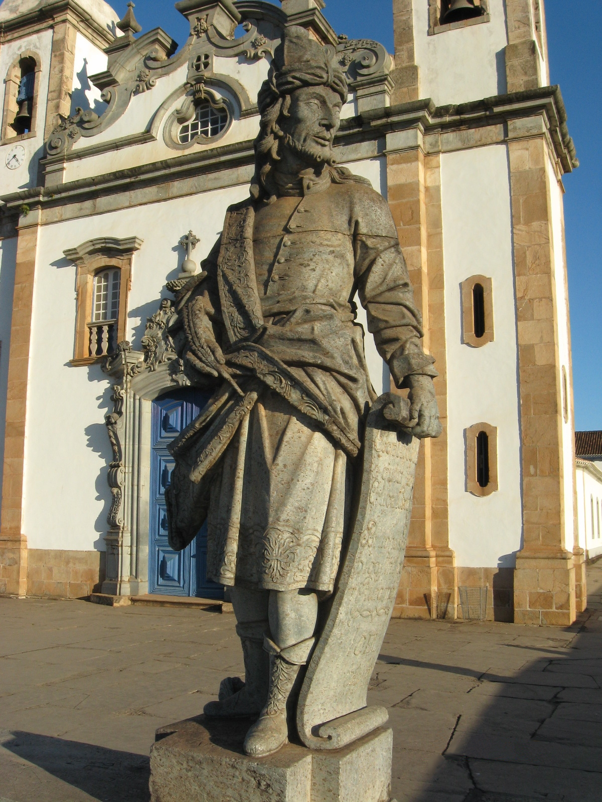 Profeta Joel - Doze profetas de Aleijadinho Congonhas Minas Gerais